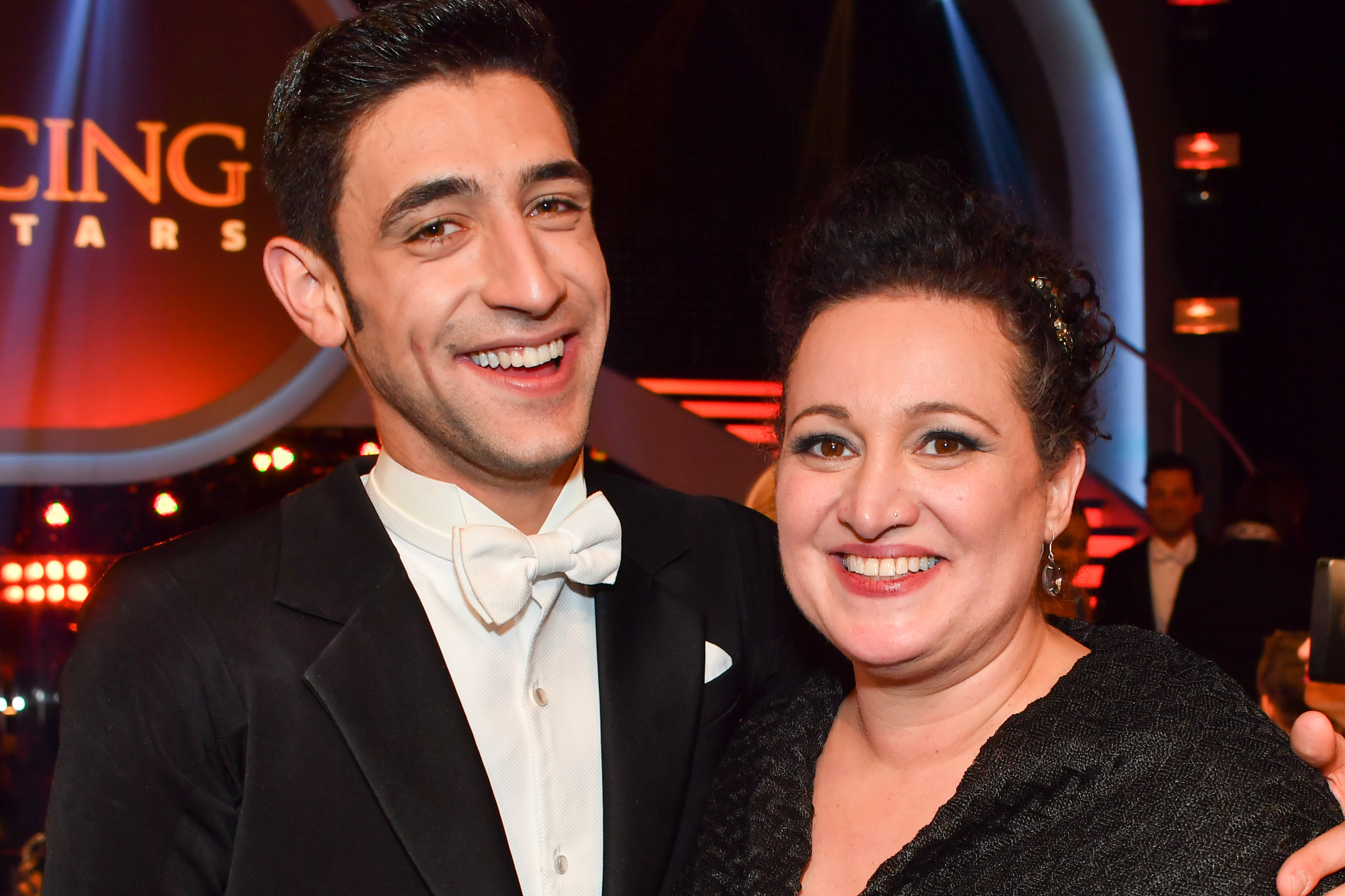 ORF Dancing Stars am 7. April 2017 in Wien. Bild zeigt Dimitar Stefanin und Riem Higazi.